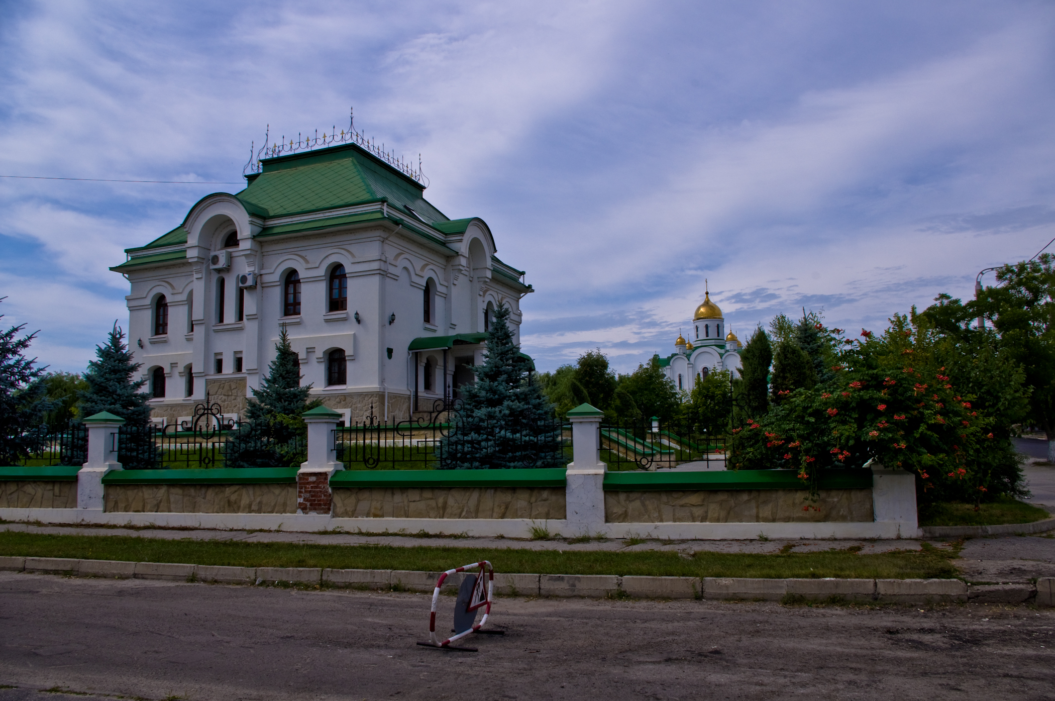 Тираспольская и Дубоссарская епархия летом 2011 года. Пусть Вас не удивляет дорожный знак. Во время съёмок по улице Шевченко велись дорожные работы (укладывался асфальт)